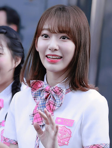 180510 상암 미야와키 사쿠라